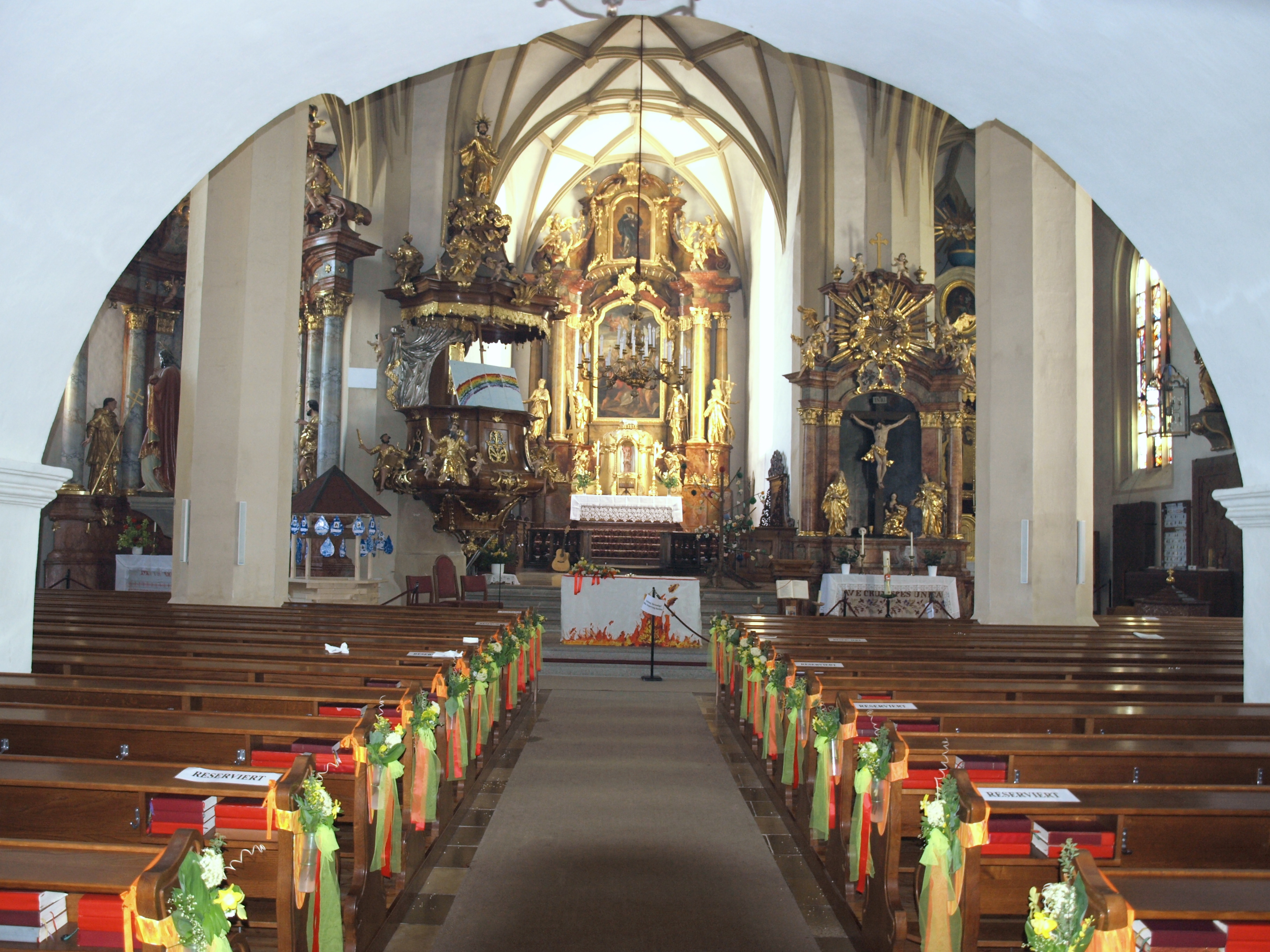 Kath. Pfarrkirche hl. Laurentius